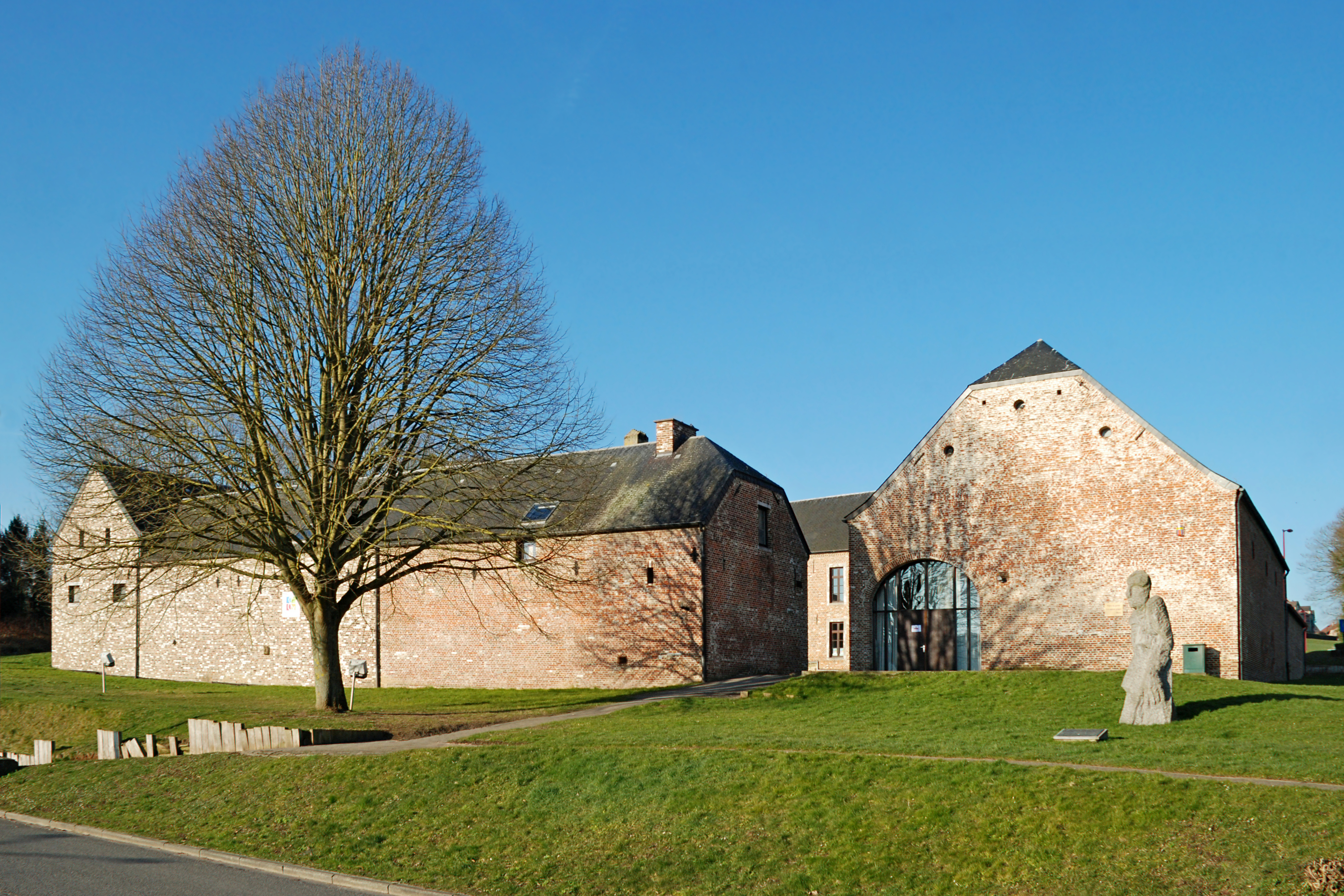 Belgique - Wallonie - Ottignies - avenue des Combattants - Ferme du Douaire This photo of immovable heritage has been taken in the Walloon Region